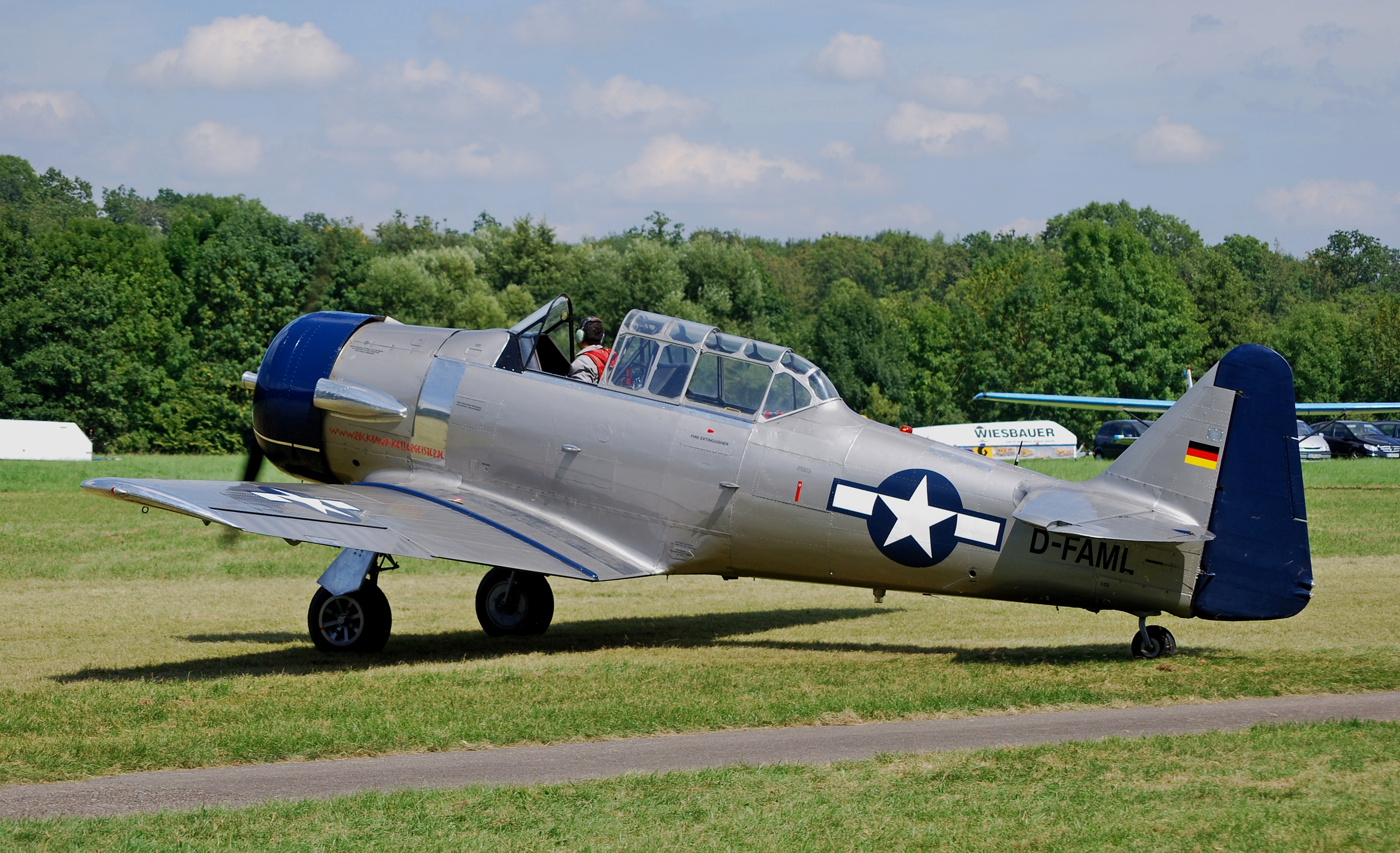 Eine North American AT-6D in Löchgau, Baden-Württemberg.